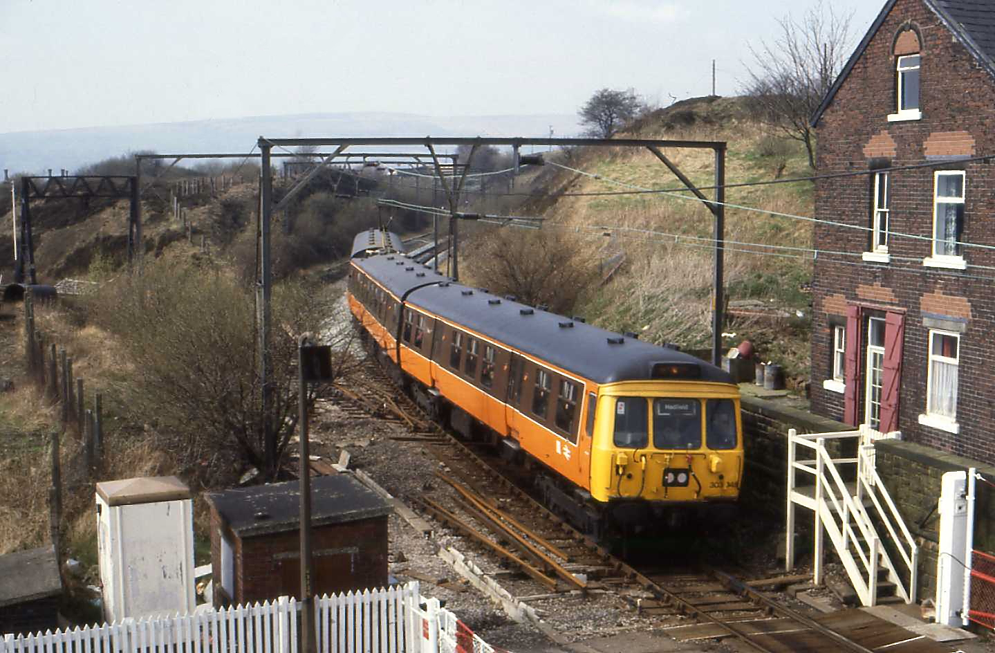 303348 Dinting